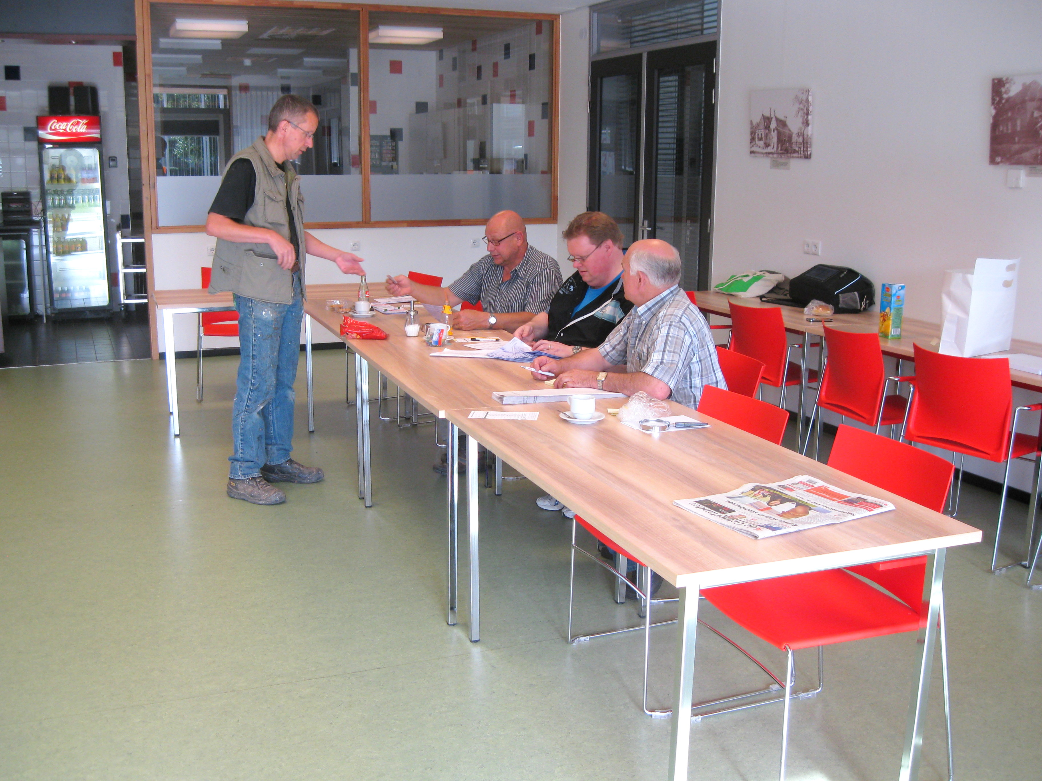 Verkiezingen Tweede Kamer 2012. Stemlokaal De Lichtenberg in Silvolde, Oude IJsselstreek.